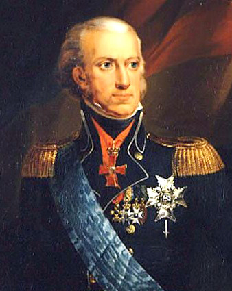 detail